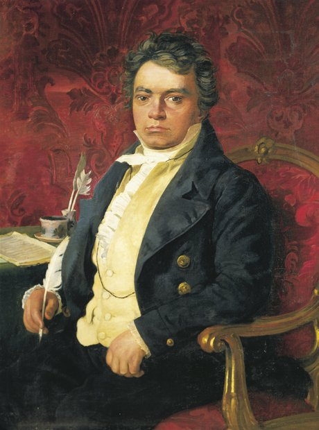 Portrait of Ludwig van Beethoven (1770-1827)